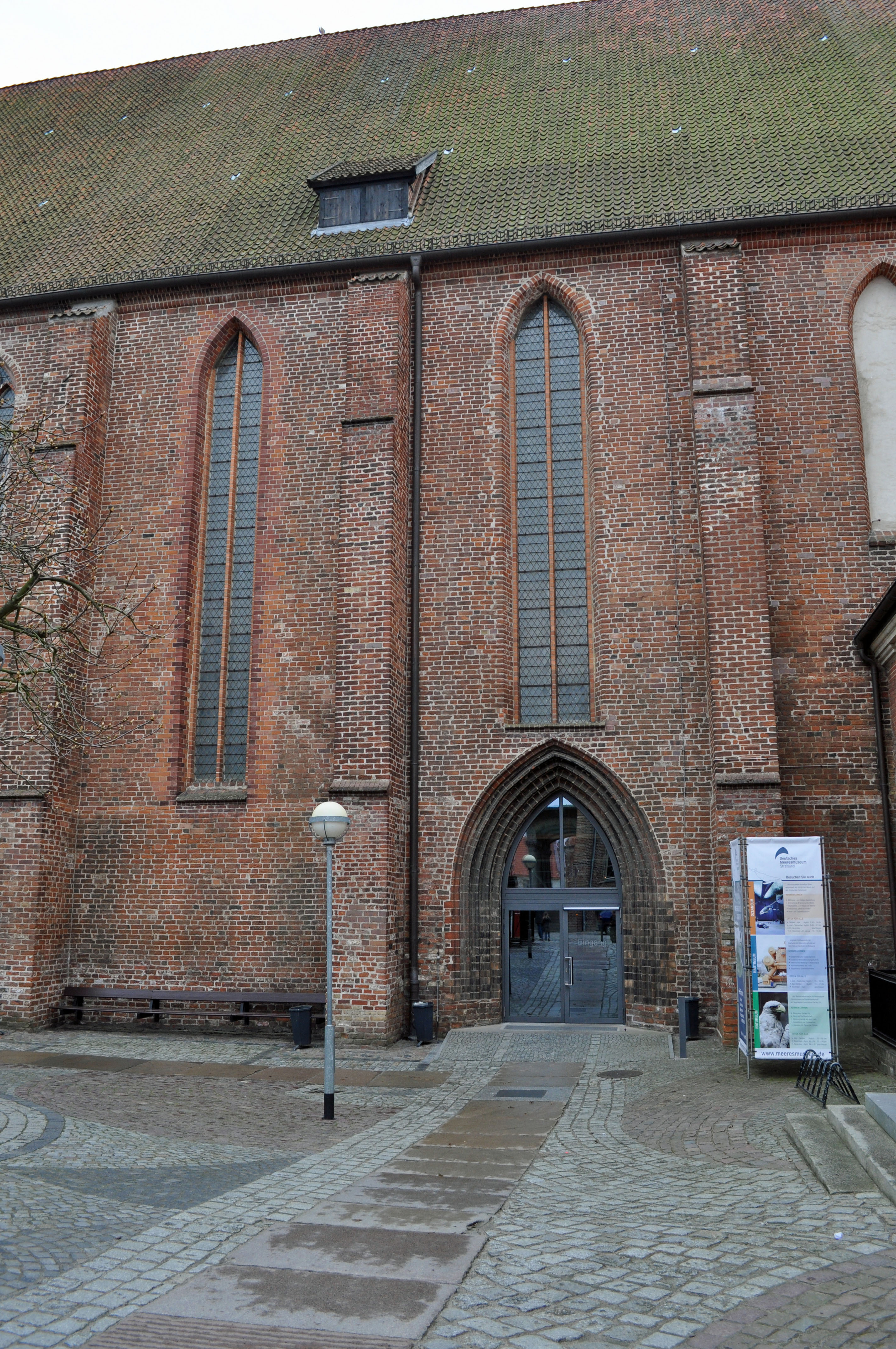 Im Meeresmuseum Stralsund. Das Deutsche Meeresmuseum ist in der ehemaligen Katharinenkirche untergebracht.